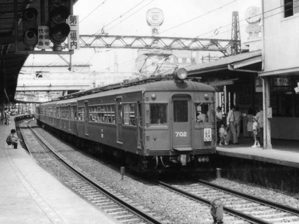 アルミサッシ化された702 Built in 1948